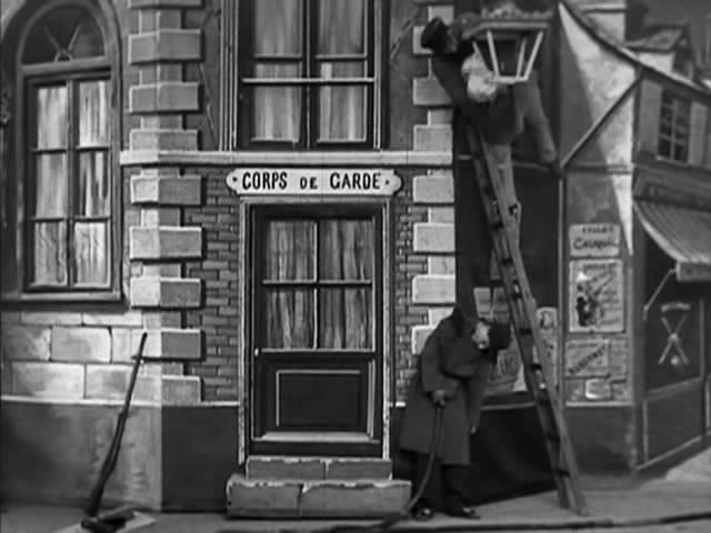 Photo du film "Un malheur n'arrive jamais seul" (Méliès, 1903)